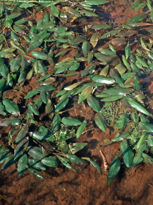 Potamogeton polygonifolius met Hottonia palustris in kwelwater.